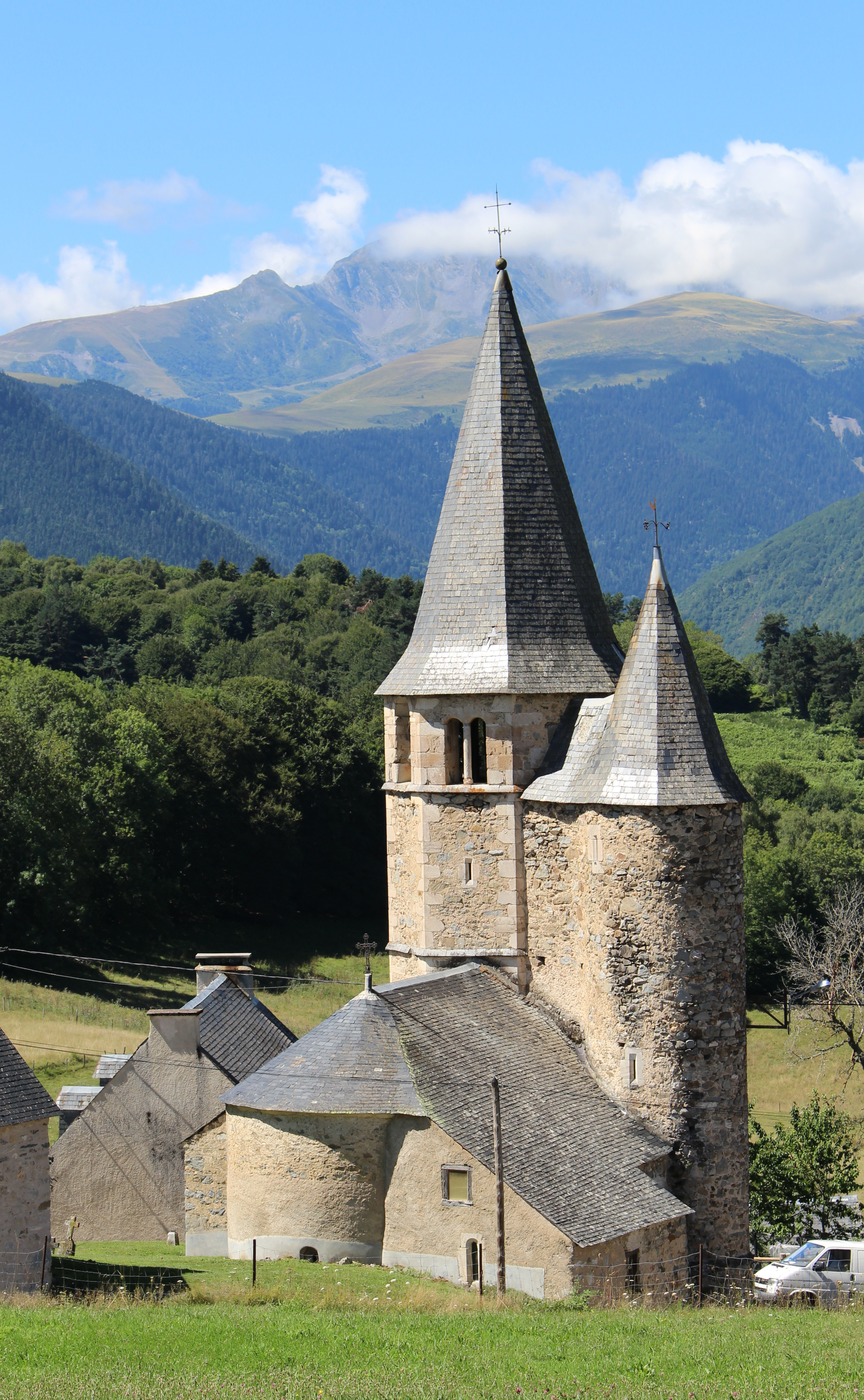 Église Sainte-Eulalie de Lançon (Hautes-Pyrénées)